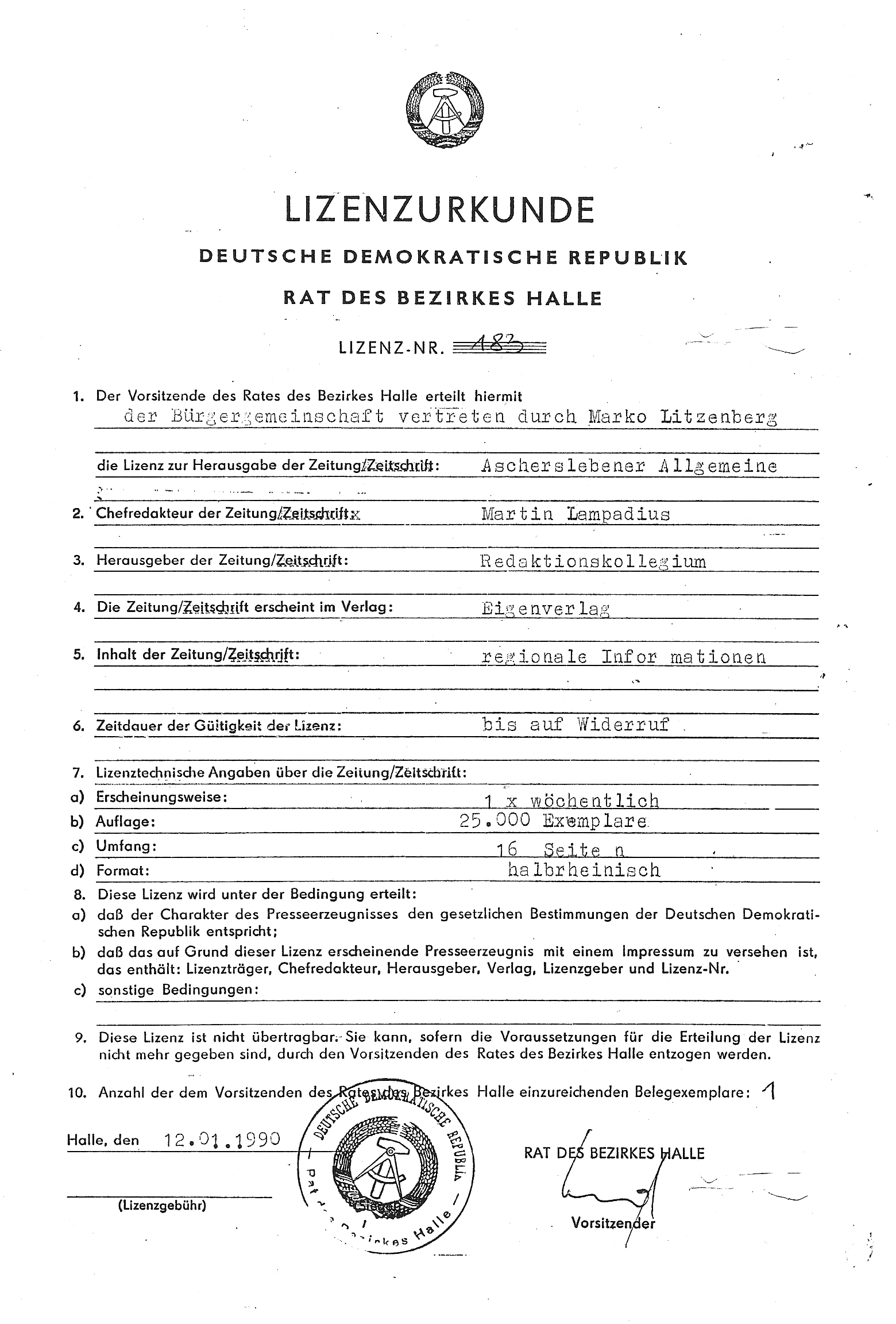 Die Lizenz: Diese Urkunde stellte die Ascherslebener Allgemeine auf rechtlich sichere Füße. Bis zur Erteilung der Lizenz erschien die Zeitung als Sonderausgabe.